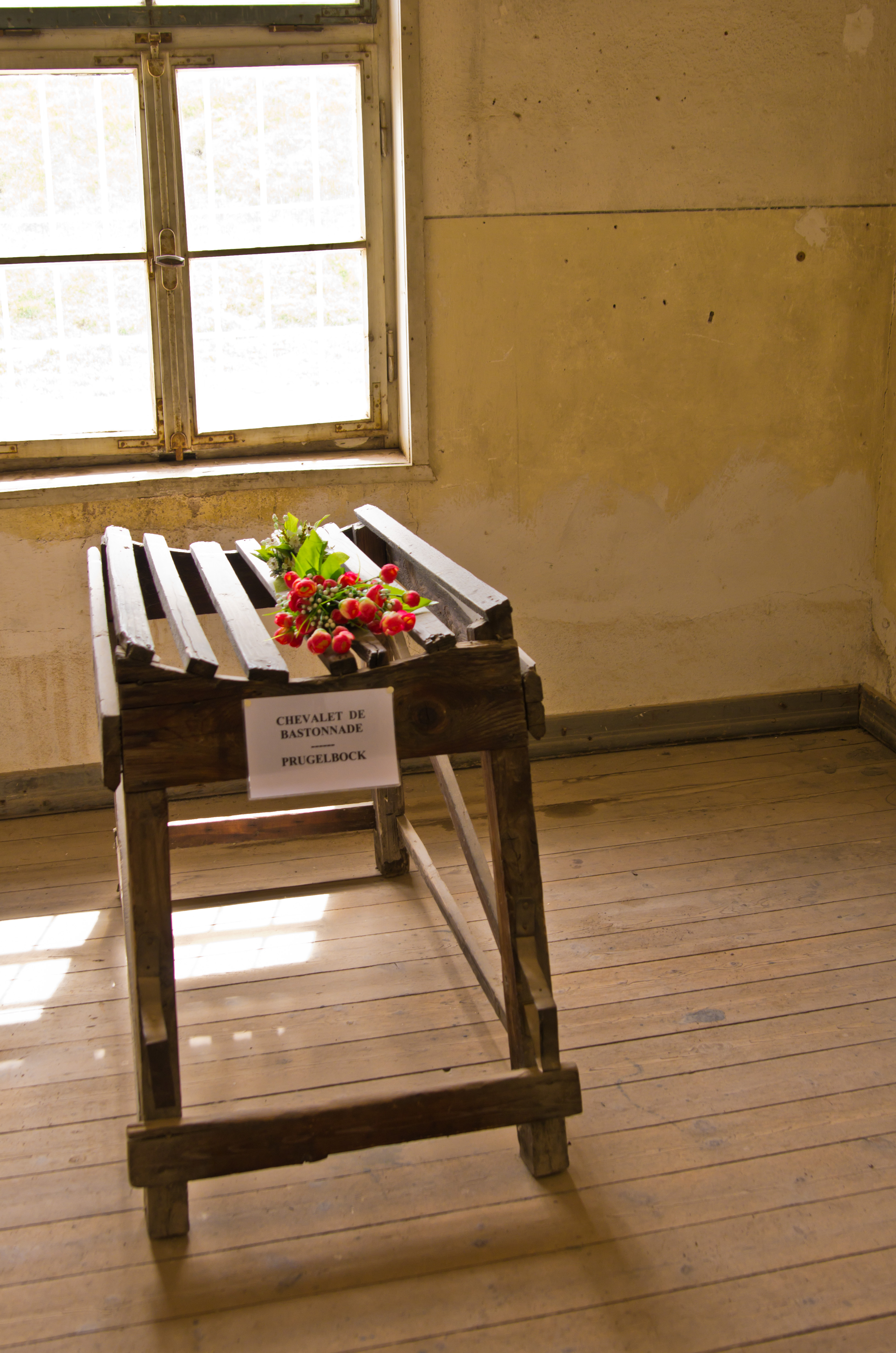 Chevalet de bastonnade du KL-Natzweiler-Struthof (dans le block cellulaire)